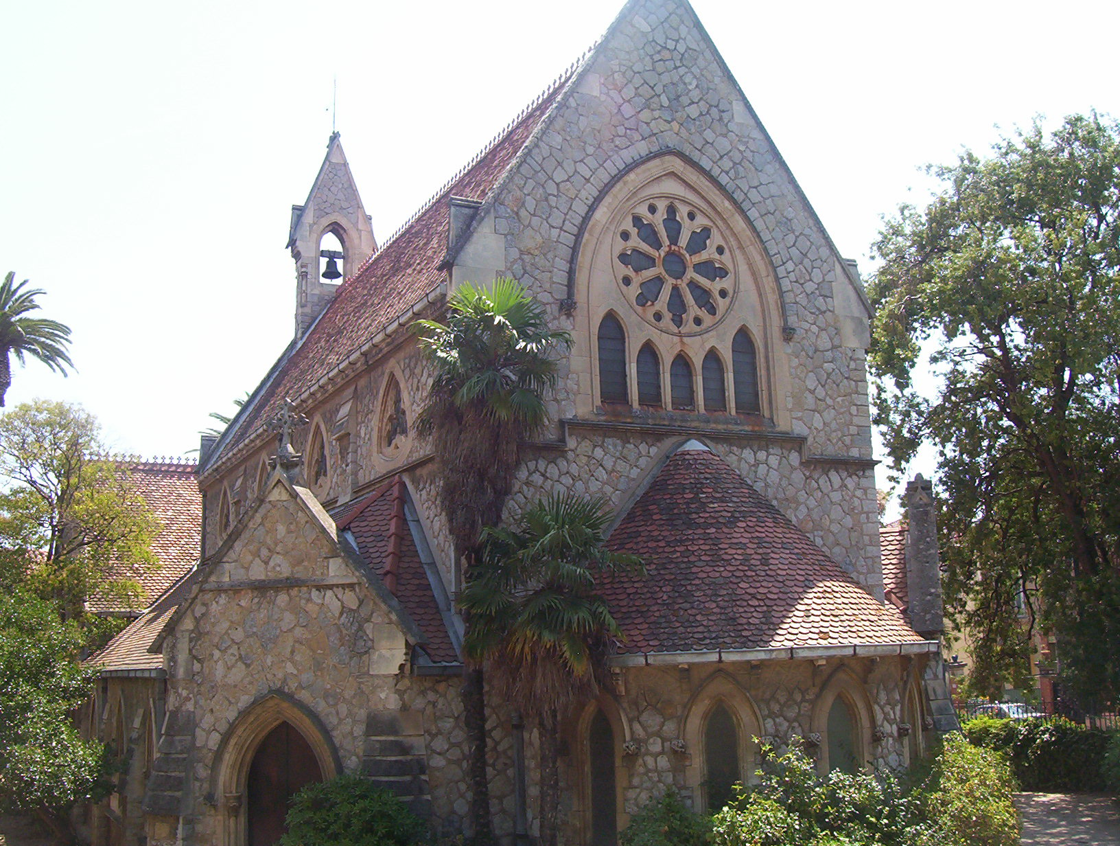 Hyères